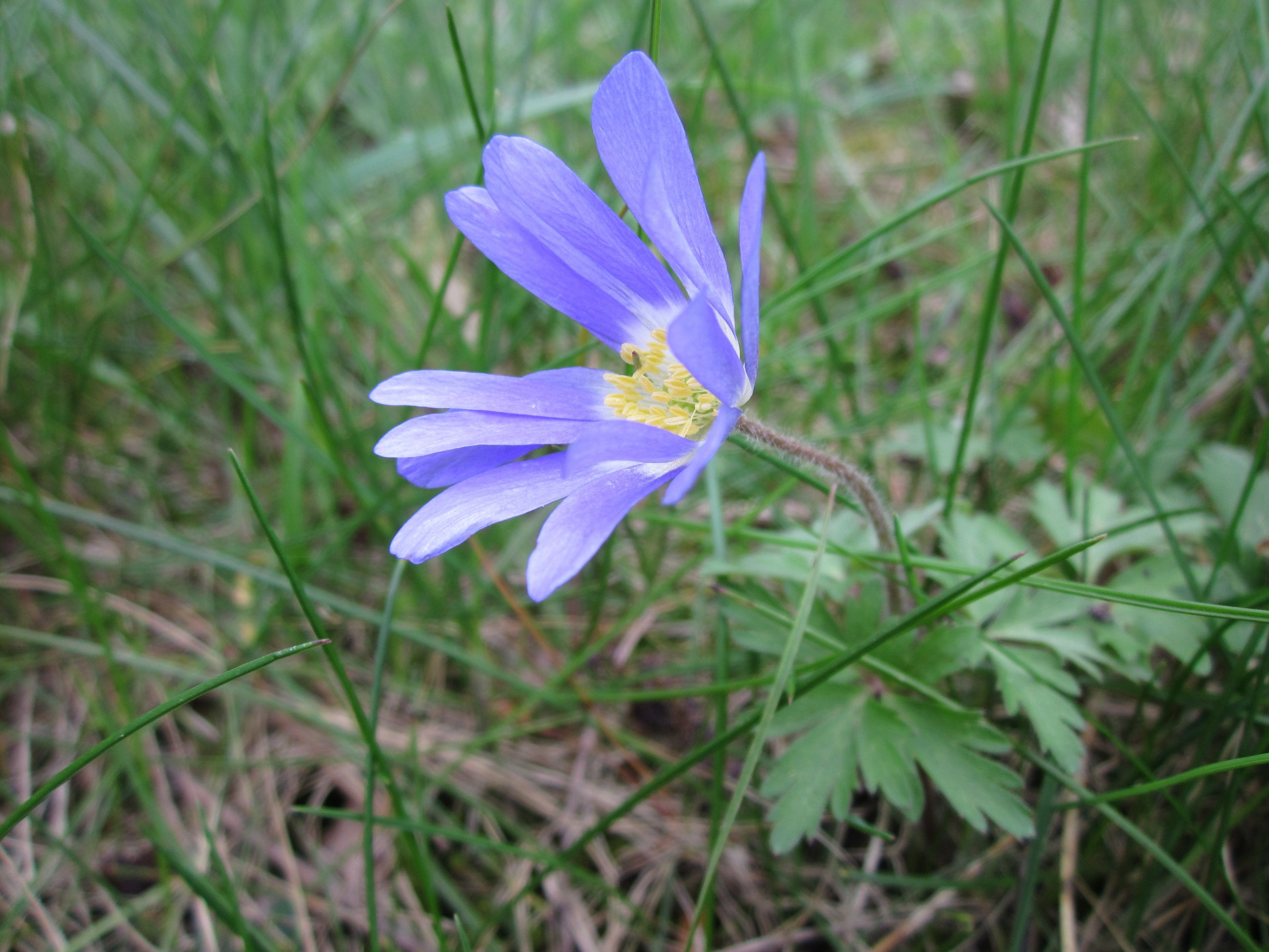 Balkan-Windröschen (Anemone blanda) im Bürgerpark Saarbrücken